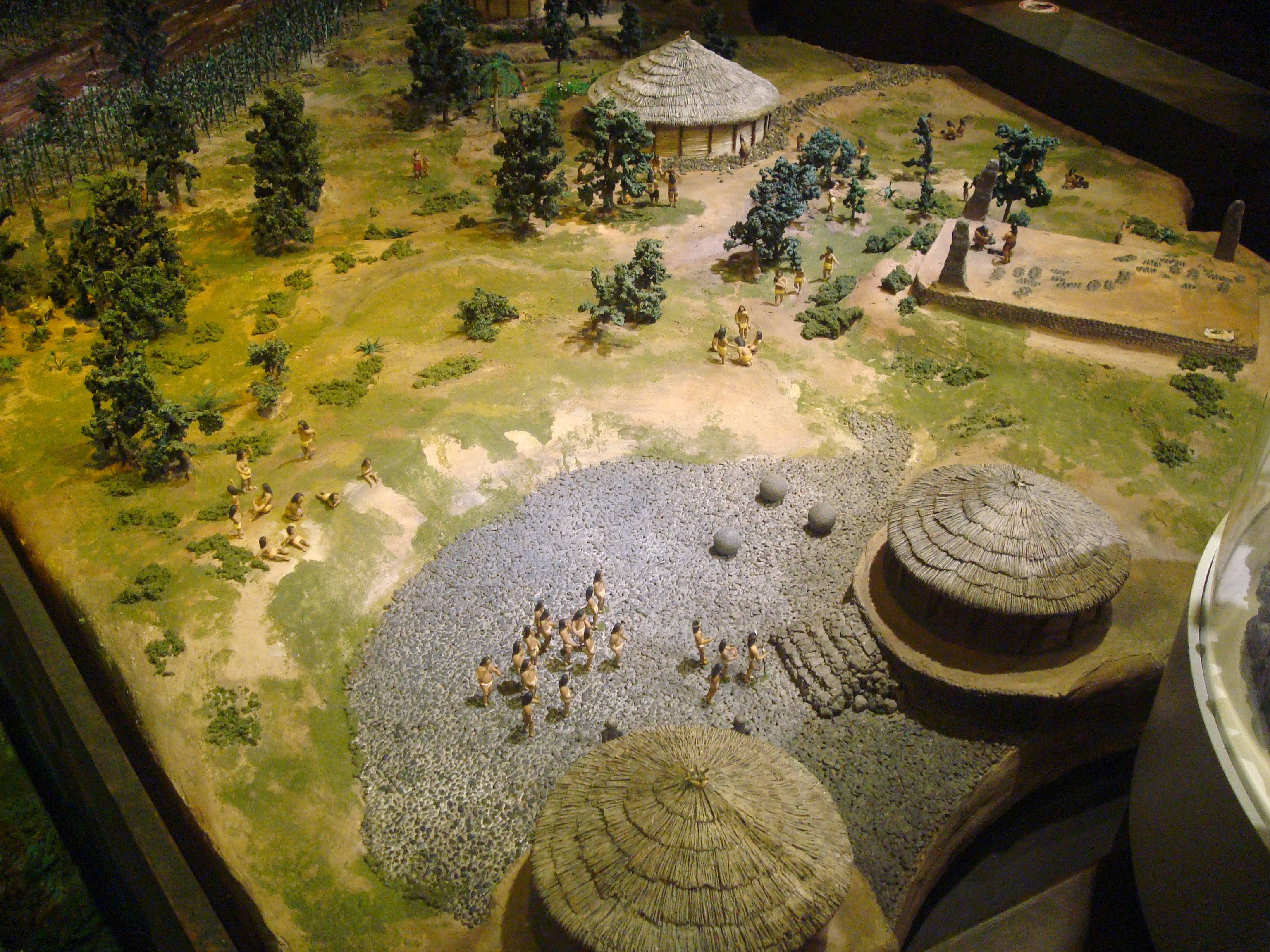 Diorama del Museo del Oro Precolombino que representa un asentamiento de la cultura del Diquís, en el Pacífico Sur de Costa Rica.